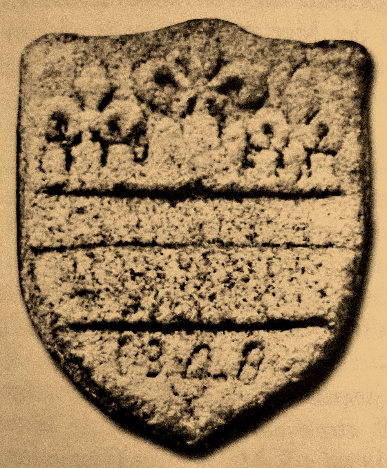 stemma antico dei del Mercato , stemma dei Sanseverino di cui erano ramo cadetto, col capo di tre monti simboleggianti i loro 3 feudi all'epoca, e il Capo d' Angiò avuto per concessione sovrana per aver partecipato alla Congiura di Capaccio e alla Battaglia di Benevento contro Federico II e Manfredi